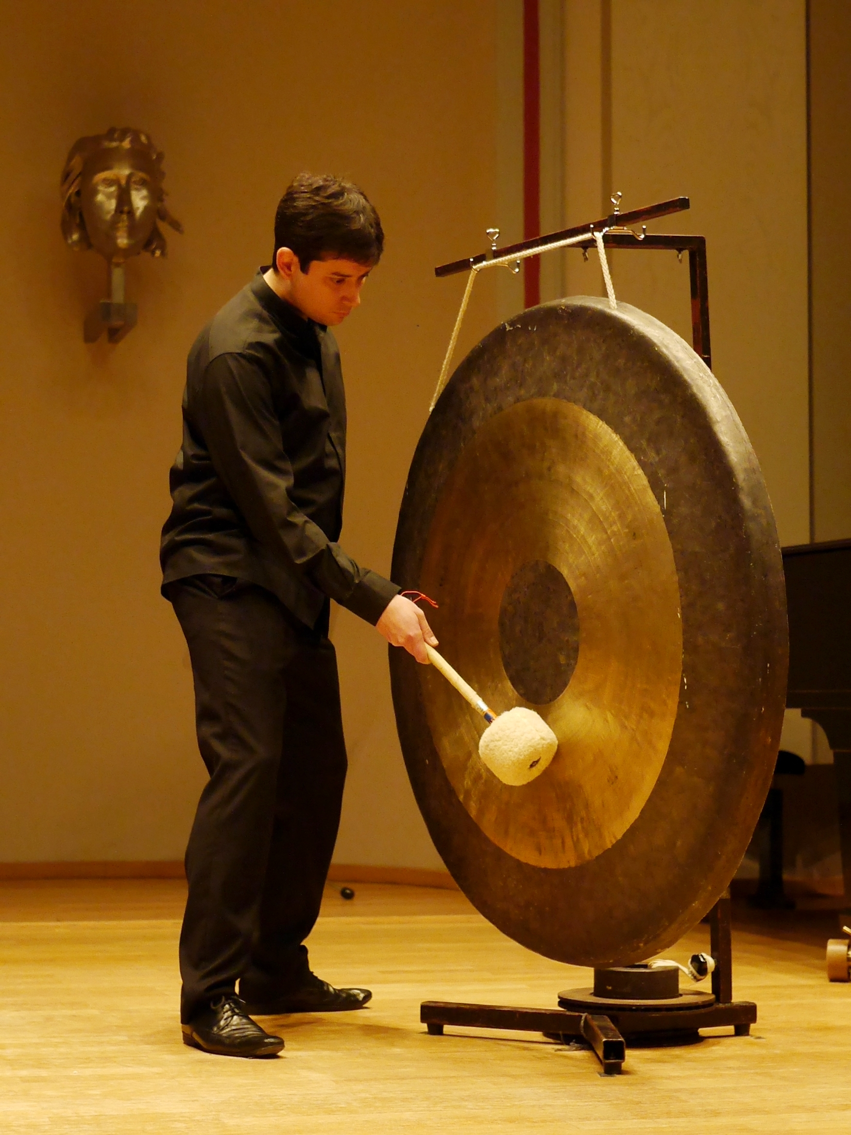 Marina Schlagintweit: „Expander“ für Tamtam und Stereotape (UA) beim KLASSENABEND am 24.01.2015 im Brahms-Saal der HfM Detmold. Antonio Ruiz Giménez - Perkussion Marina Schlagintweit - Tape earquake - epizentrum für experimentelle Musik